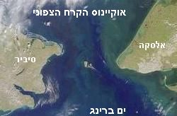 מצר ברינג במבט מהחלל Bering strait, image taken by MISR sattelite